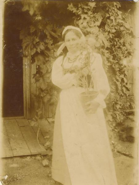 Sofija Pšibiliauskienė (1867 m. rugsėjo 16 d. Paragiuose, Papilės valsčius, Šiaulių apskritis, Rusijos imperija – 1926 m. kovo 14 d. ten pat) – Lietuvos visuomenės veikėja, rašytoja. Kartu su seserimi žinoma slapyvardžiu Lazdynų Pelėda.